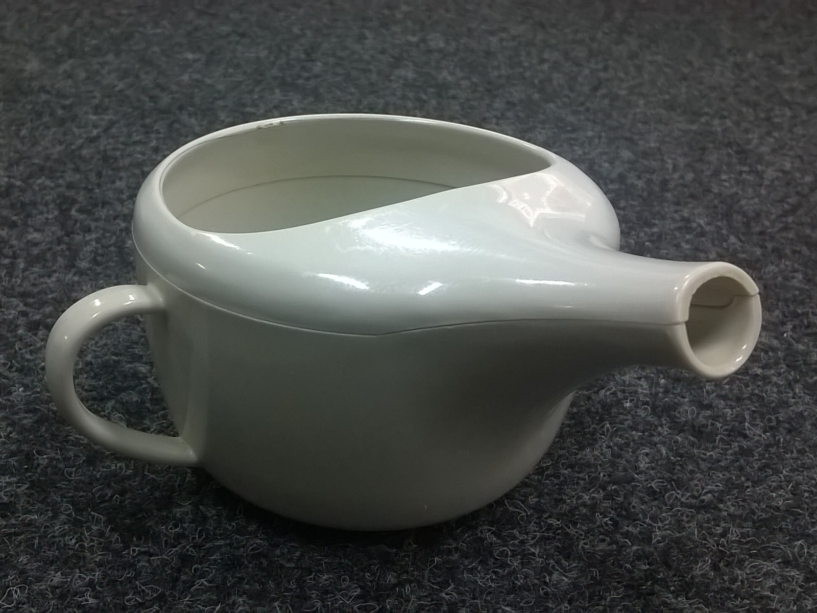 Schnabeltasse, proudly presented by Wikipedia:Kontor Hamburg